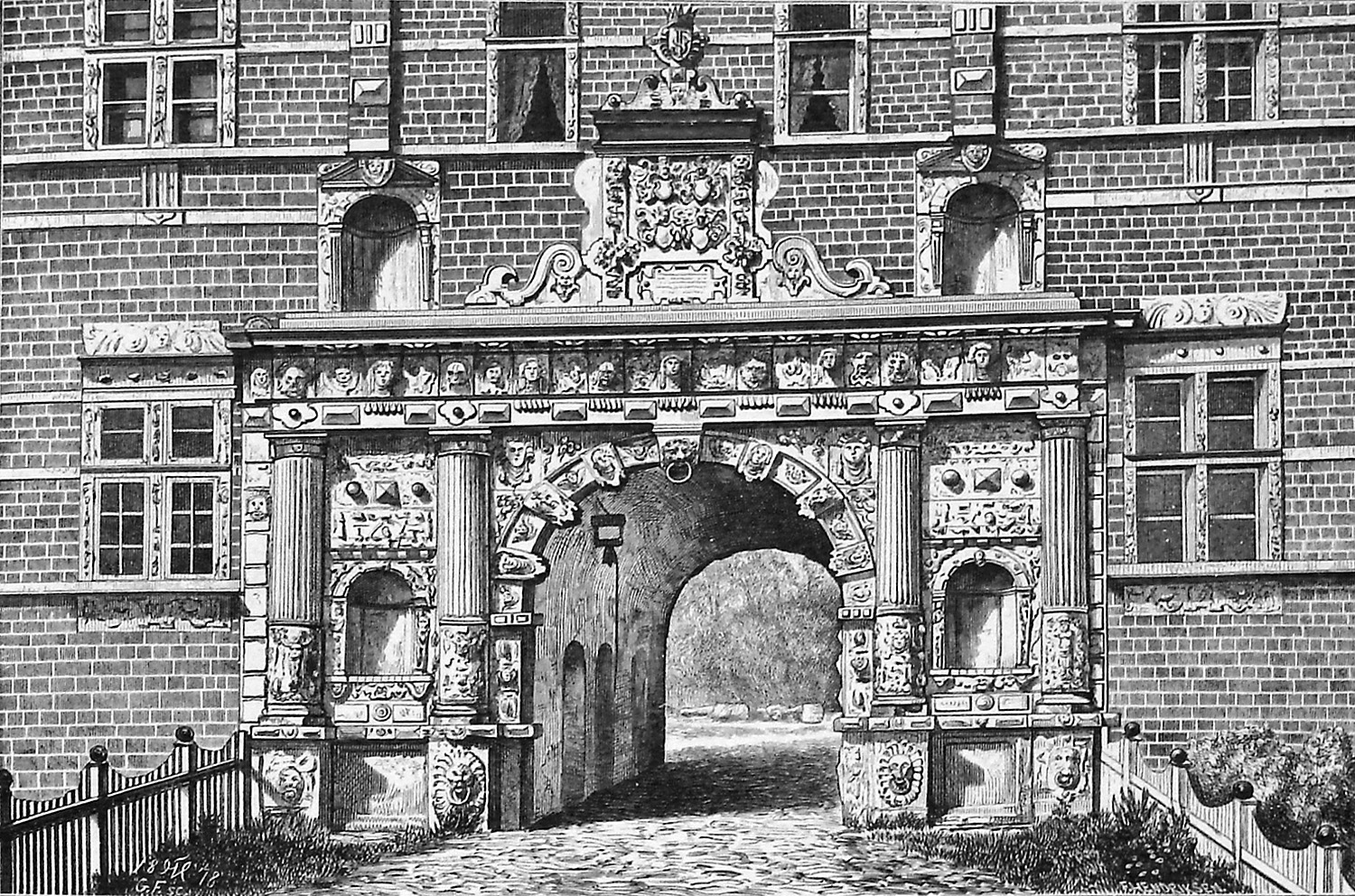 Portudsmykning på Voergaard Slot